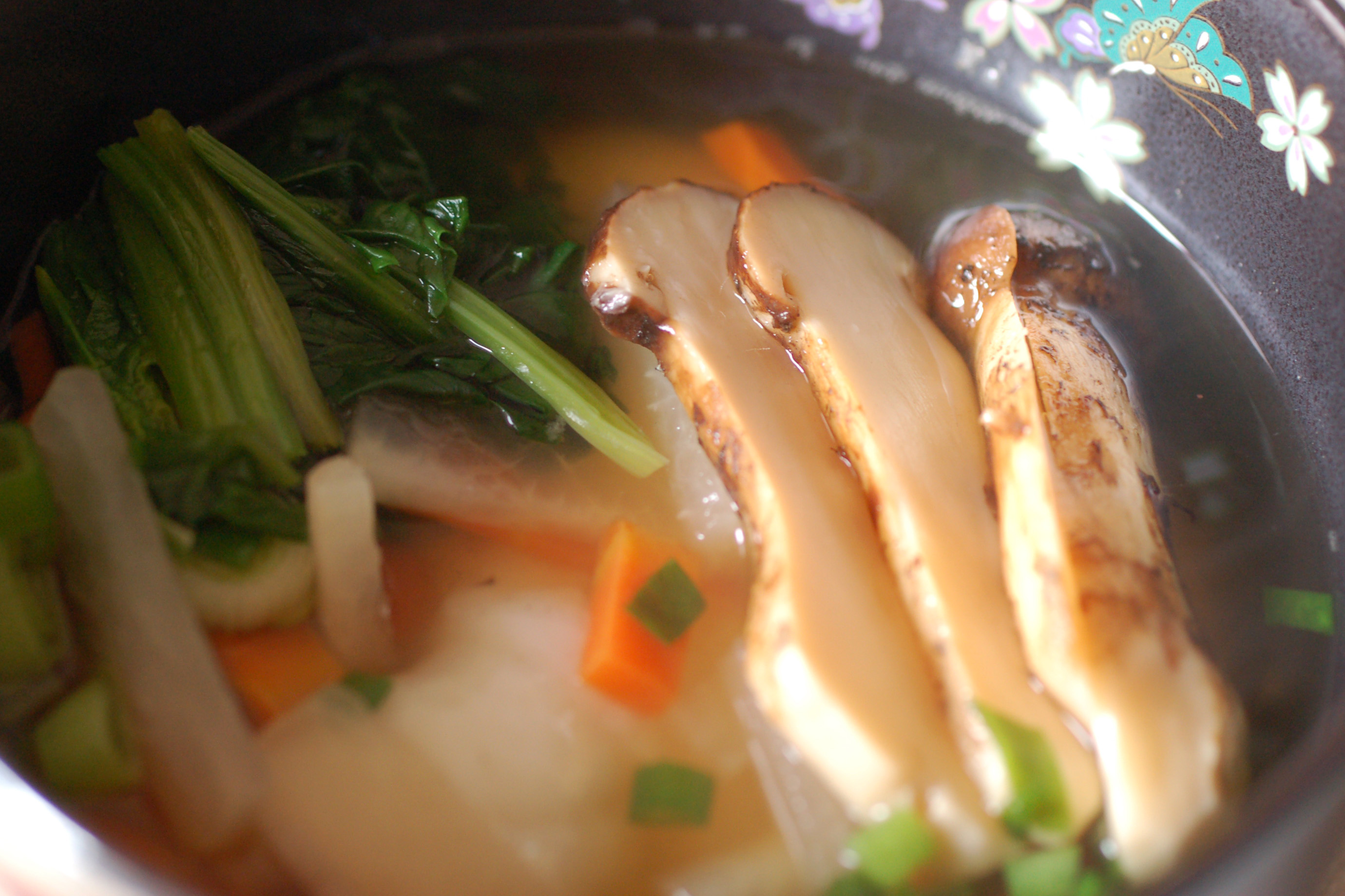 Jan 1, 2007 at 13:53 JST (自宅・食卓)zoni*雑煮